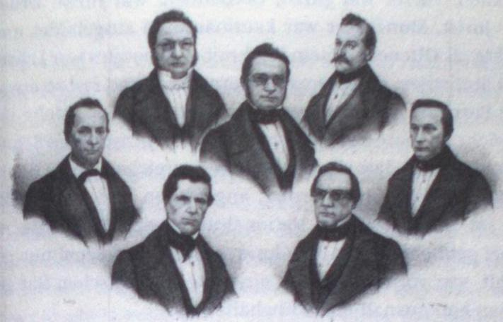 Die ersten Bundesräte von 1848 Obere Reihe von links nach rechts: Henri Druey, Jonas Furrer, Ulrich Ochsenbein; Untere Reihe von links nach rechts: Munzinger, Franscini, Näff, Frey-Herosé.